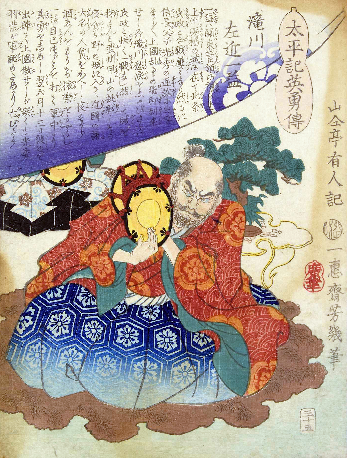 太平記英勇伝：三十五、滝川左近一益 （1867年作）